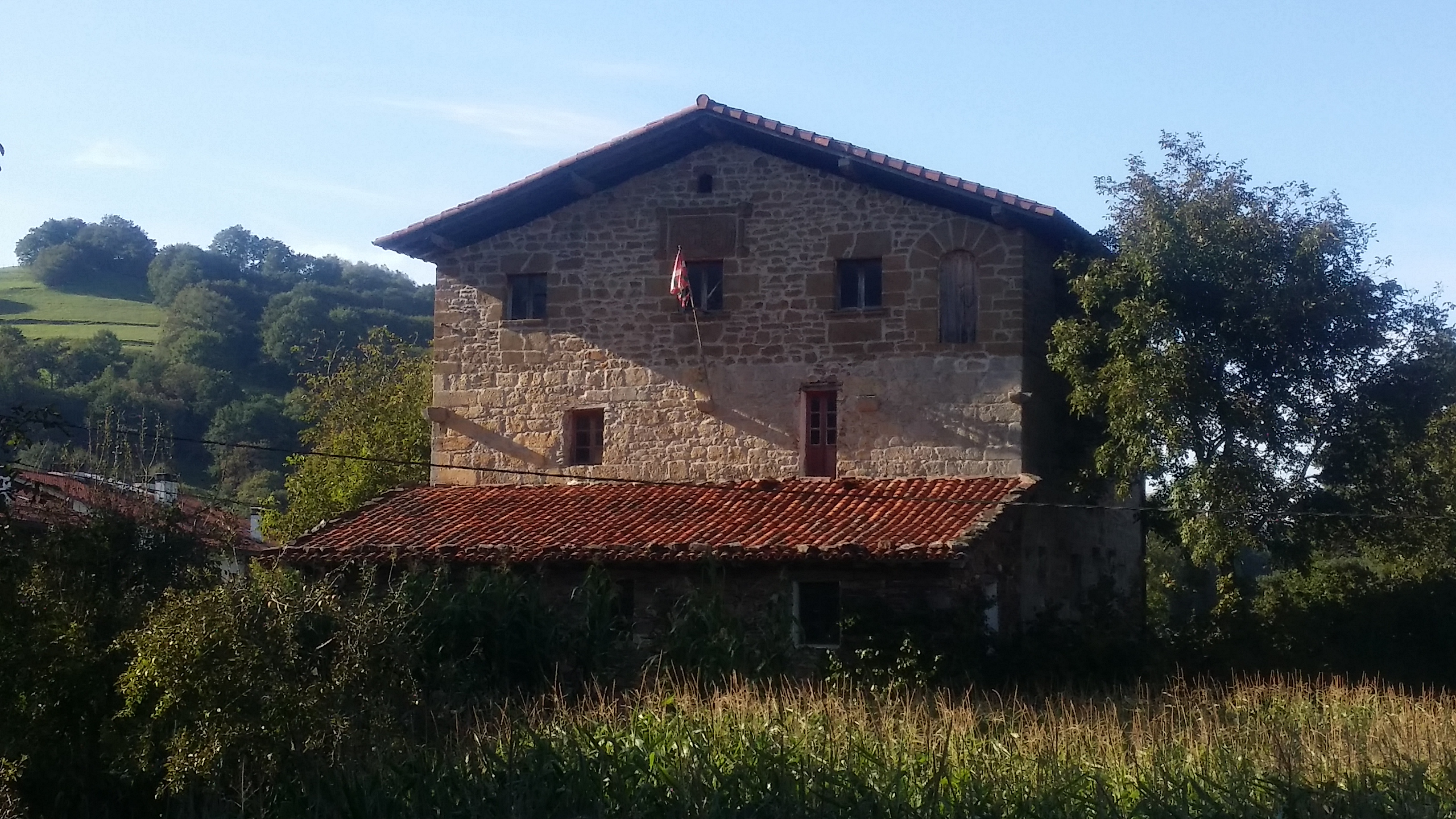 Berastegiko dorretxea